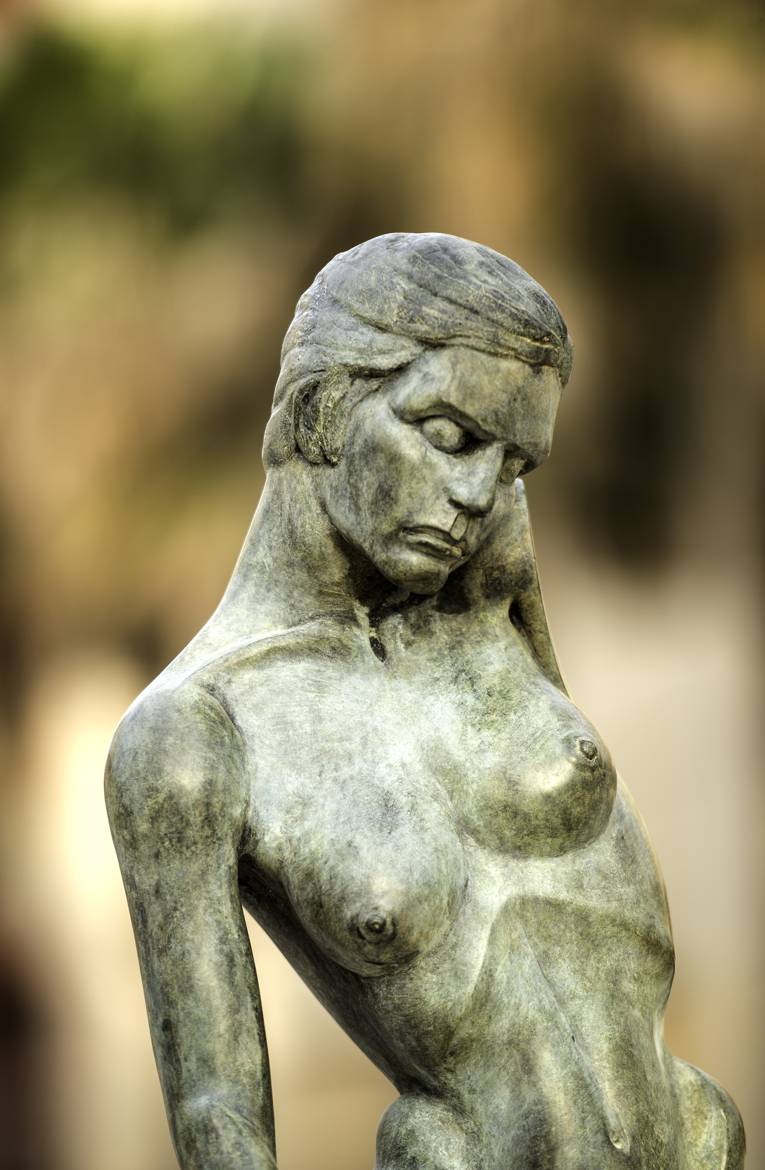 "Mujer", escultura de Mustafa Arruf (2002).